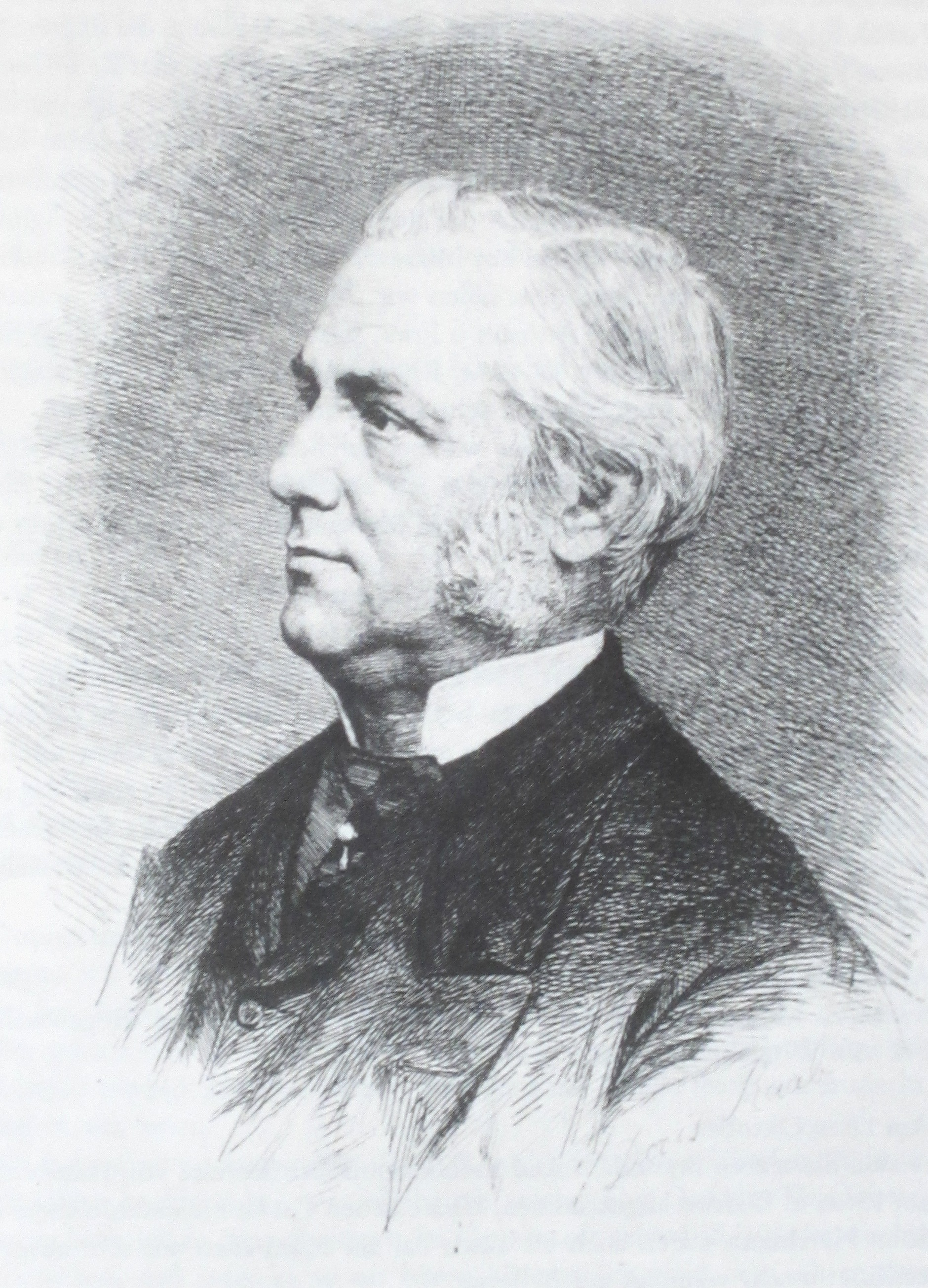 Friedrich Max Müller (1823–1900)